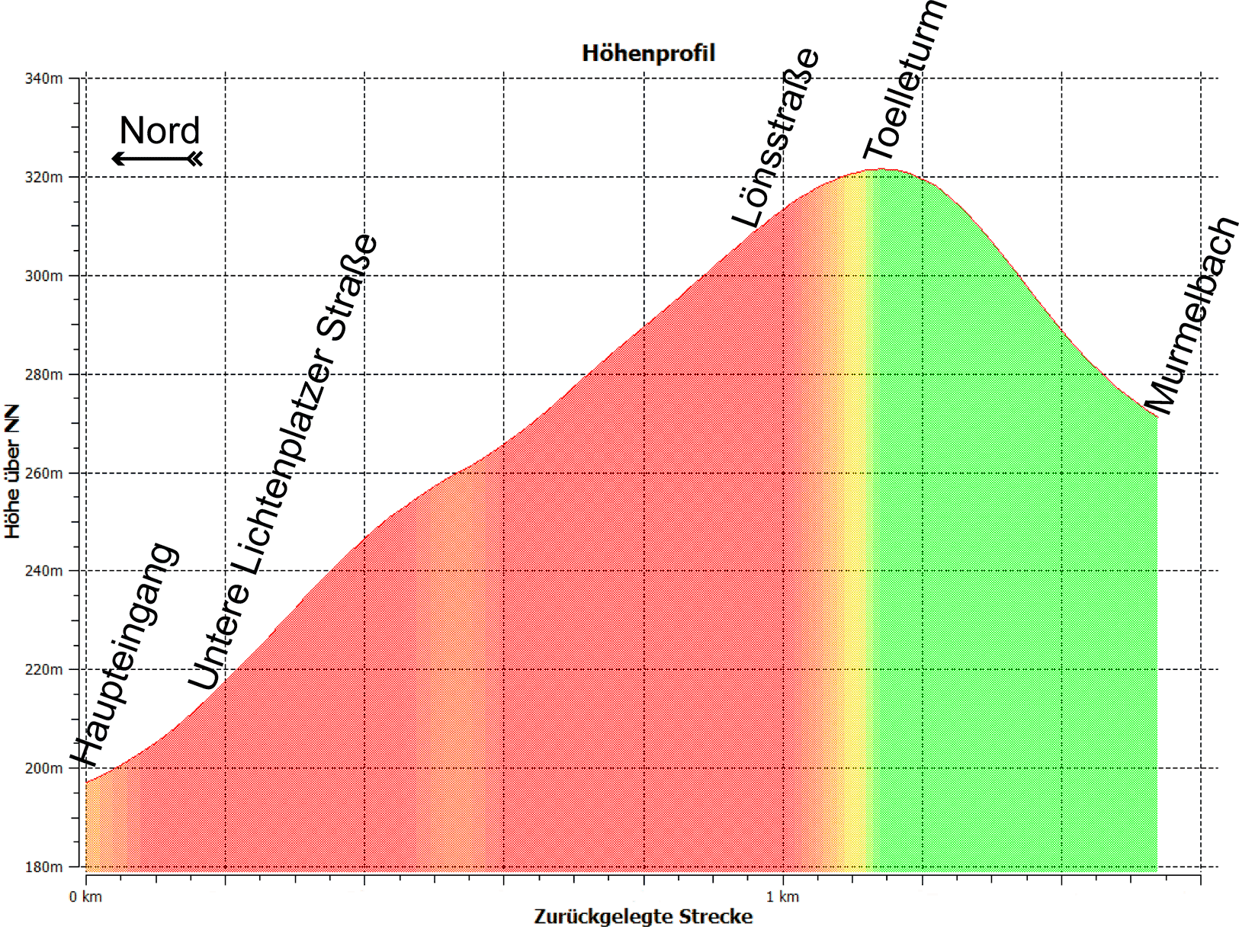 Höhenprofil der Barmer Anlagen in Wuppertal